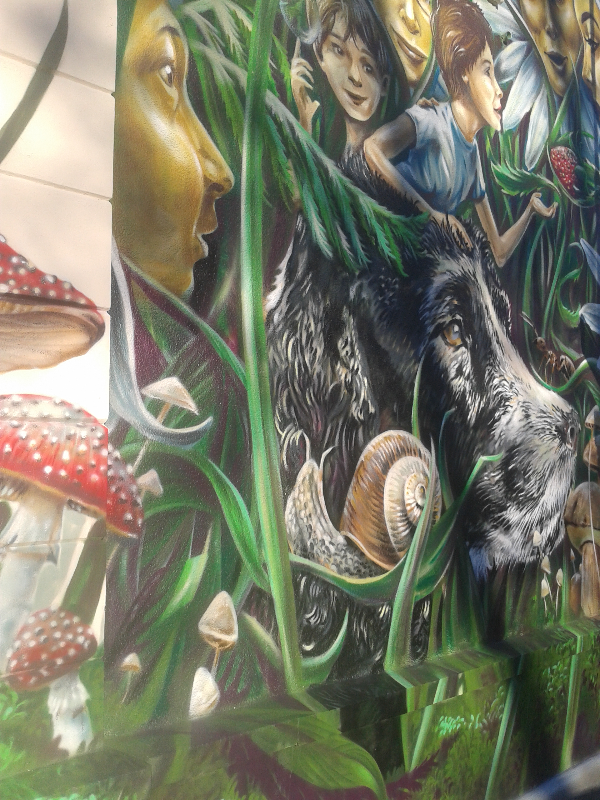 Zu sehen ist das Graffiti-Kunstwerk von Tom Brane Ecke Kirchstraße-Konradstraße anno 2016. Detailaufnahme.